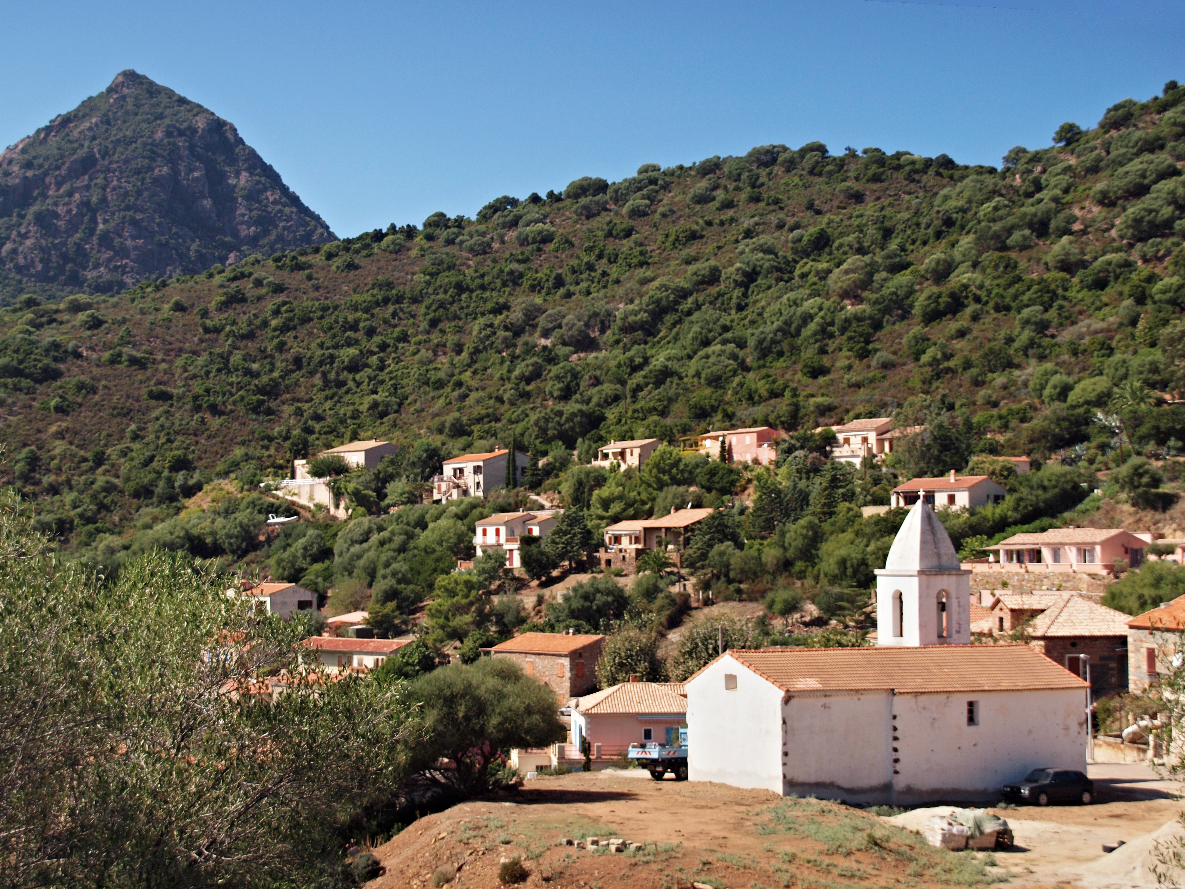 Osani (Corsica) - Vue du village